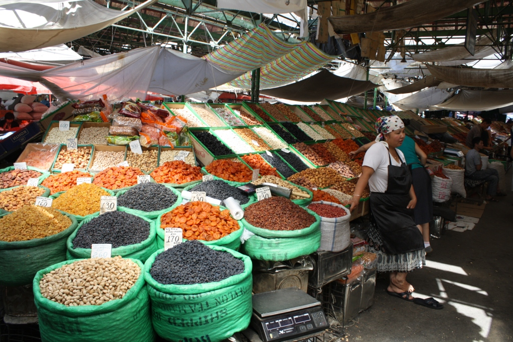 Osh bazaar is one of the largest bazaars in Bishkek, Kyrgyzstan.